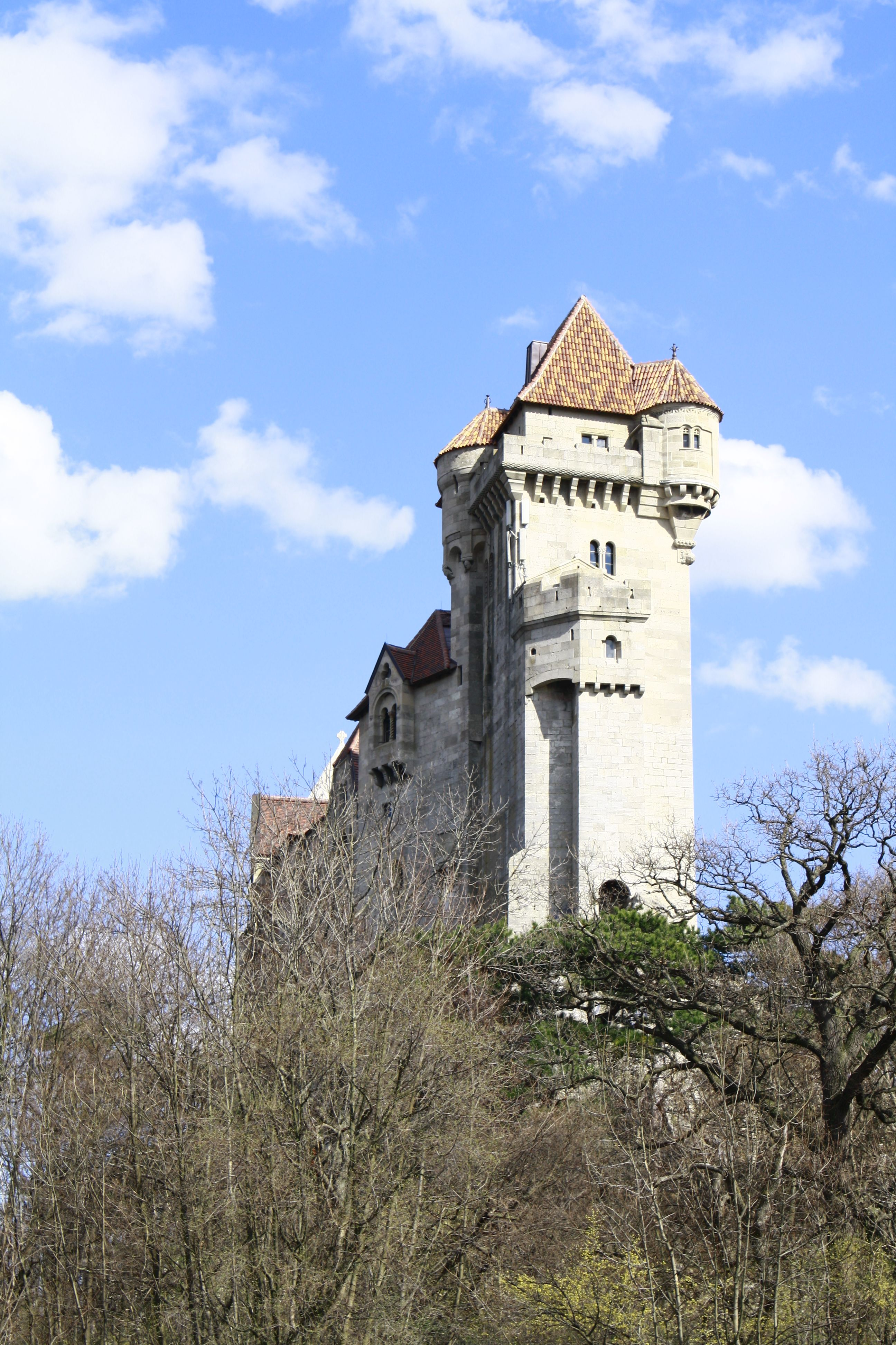 Burg Liechtenstein in Niederösterreich